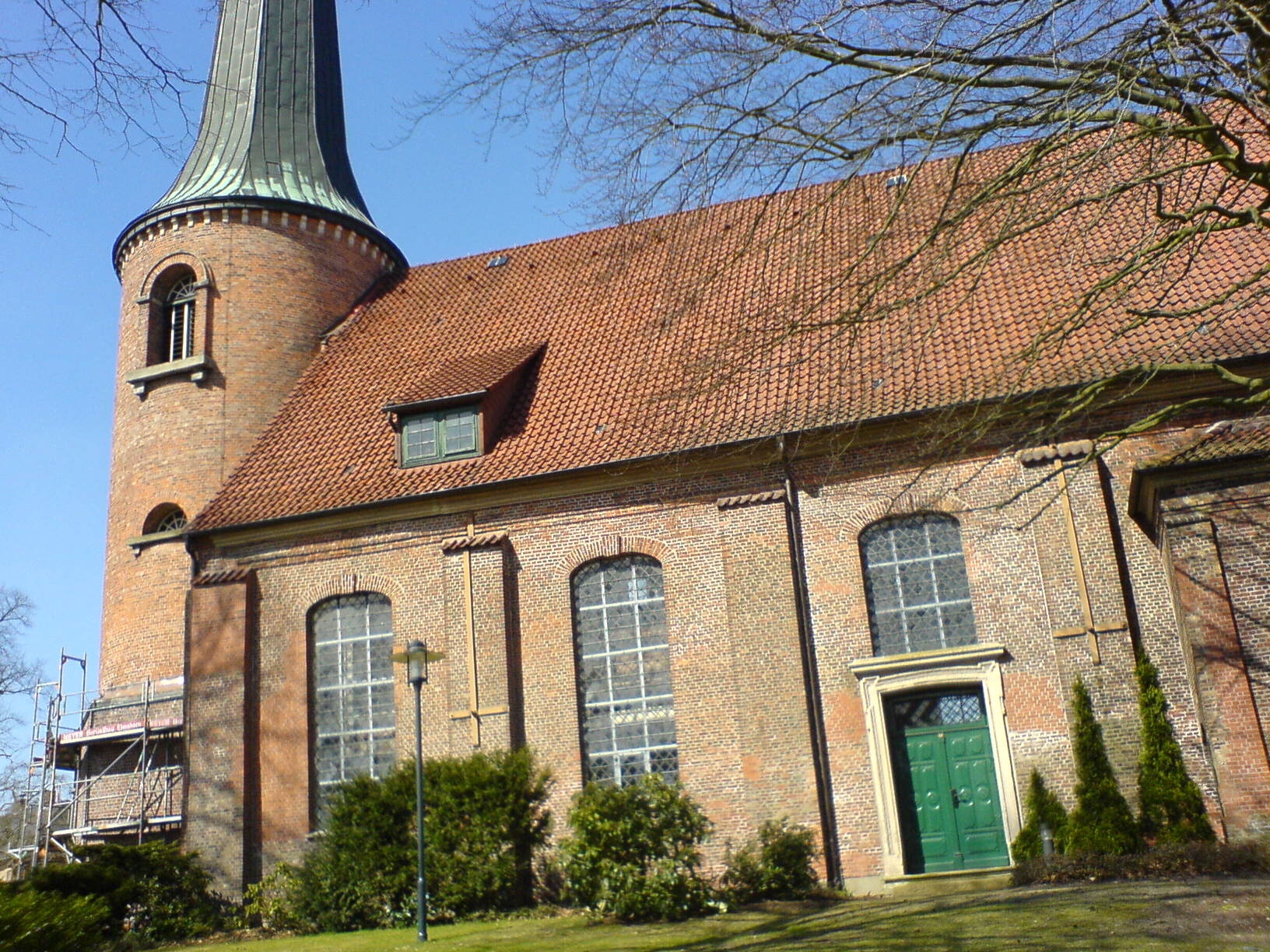 Heiligen Geist Kirche, Barmstedt